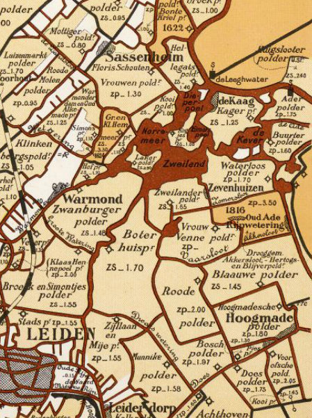 Veen-_en_Geestlanden